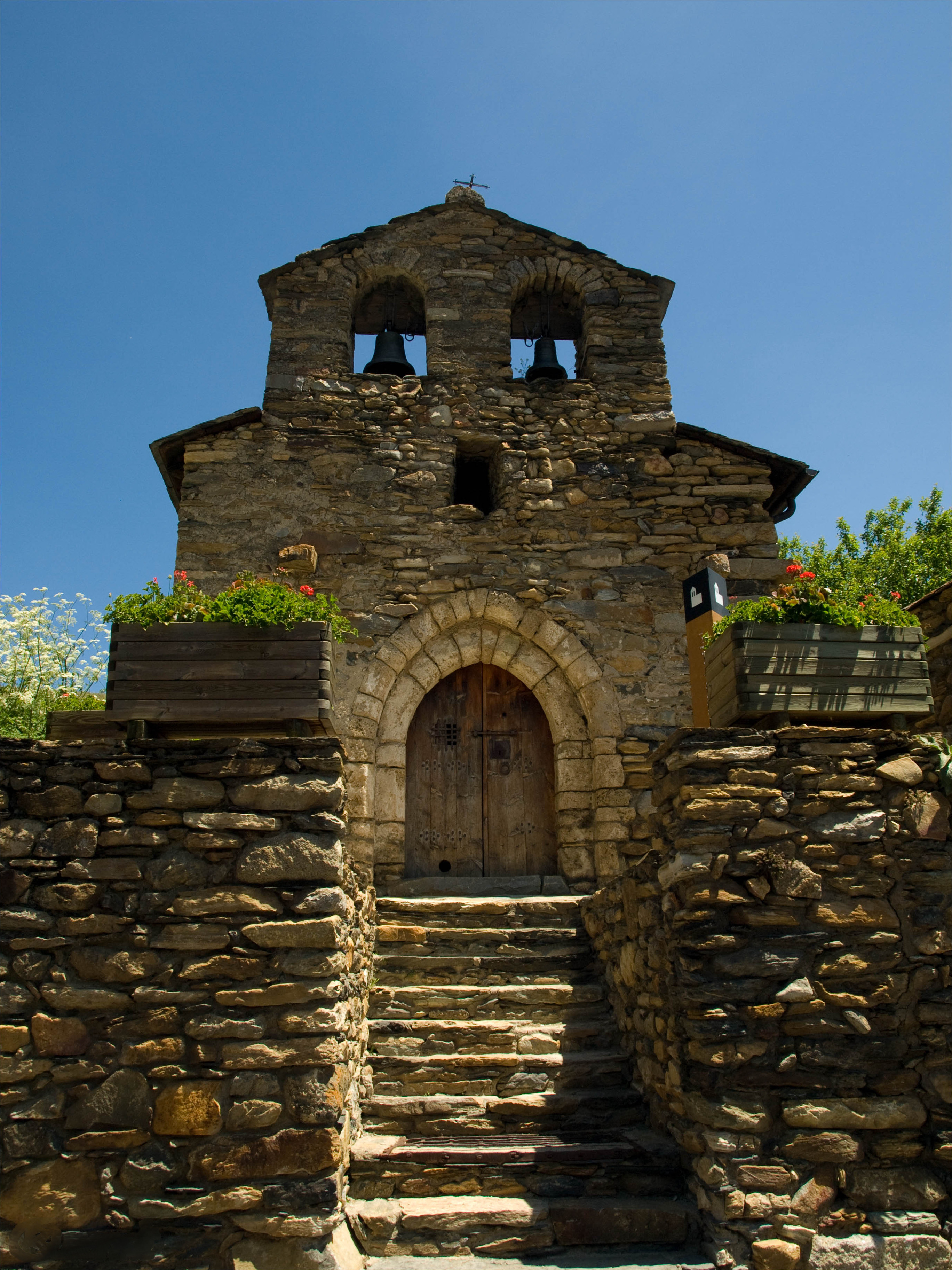 Església de Sant Miquel de Prats